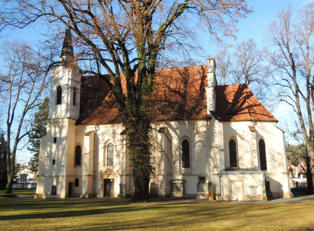 Kostel Nejsvětější Trojice (Rokycany), Míru, Rokycany